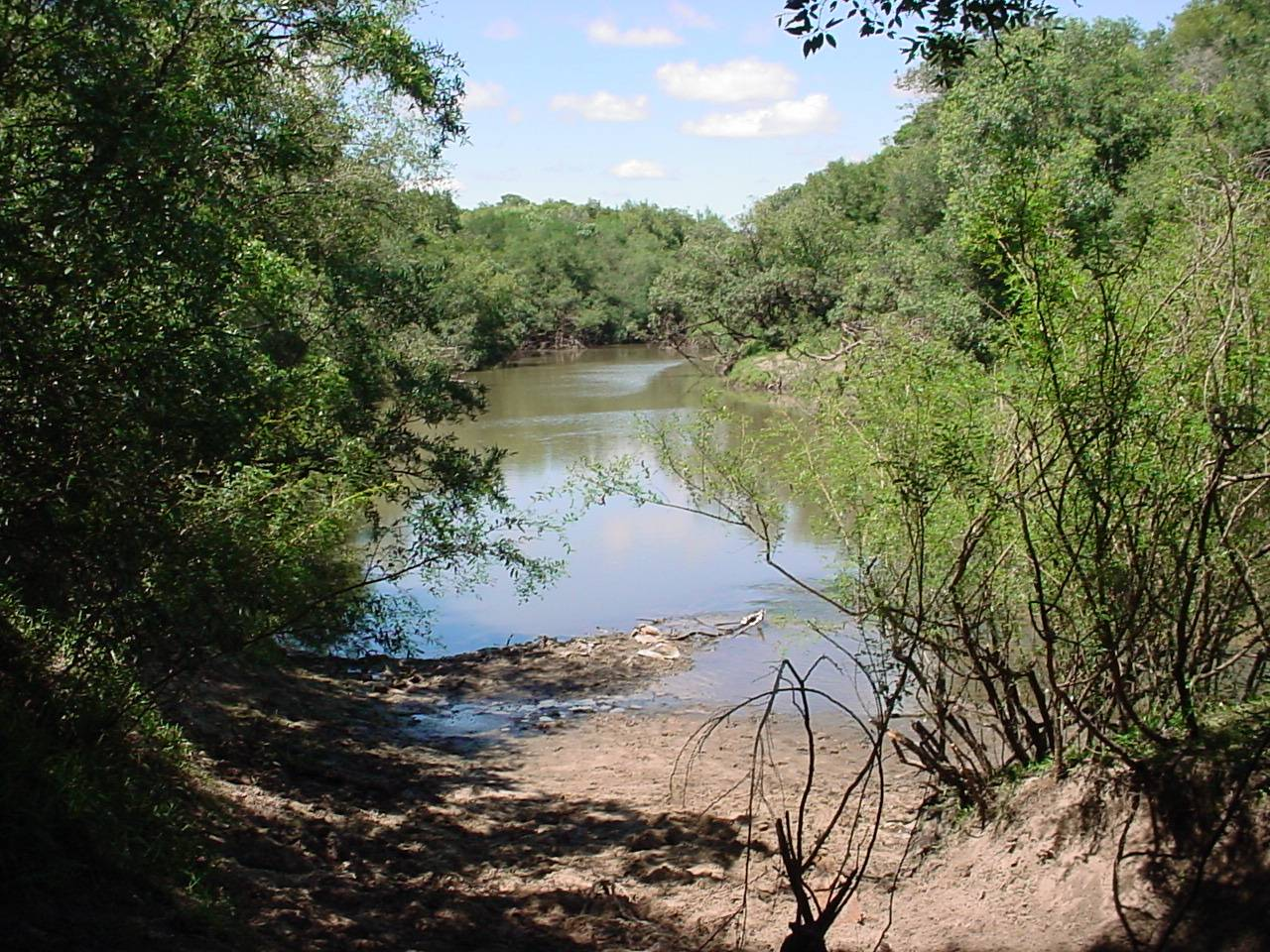 Vista do Rio Inhanduí no interior de Alegrete/RS - Brasil - no distrito de mesmo nome a 34 Km da sede do município